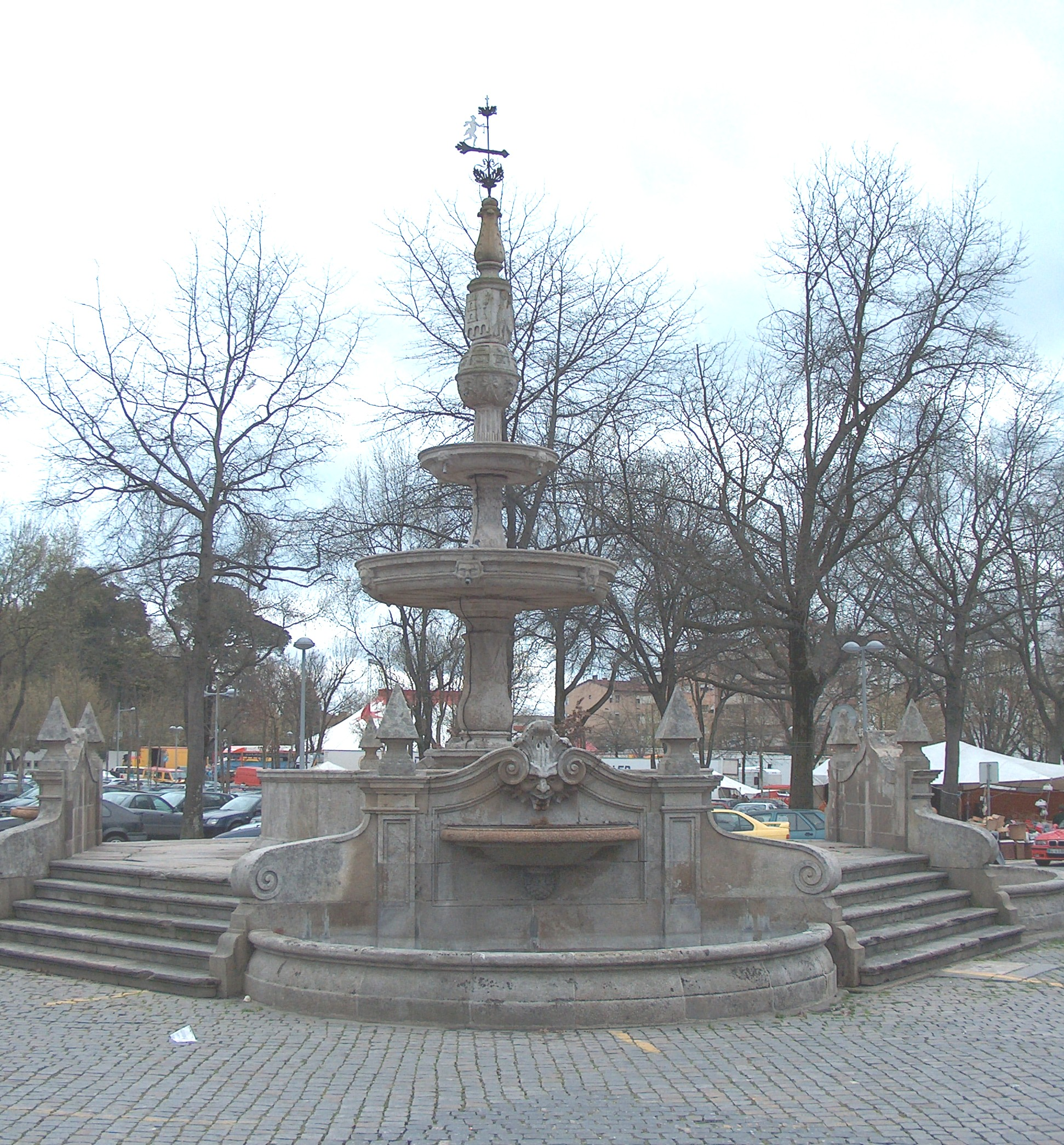 Chafariz do Campo da Feira, situado no Passeio dos Assentos ou das Obras, em Barcelos, Portugal.